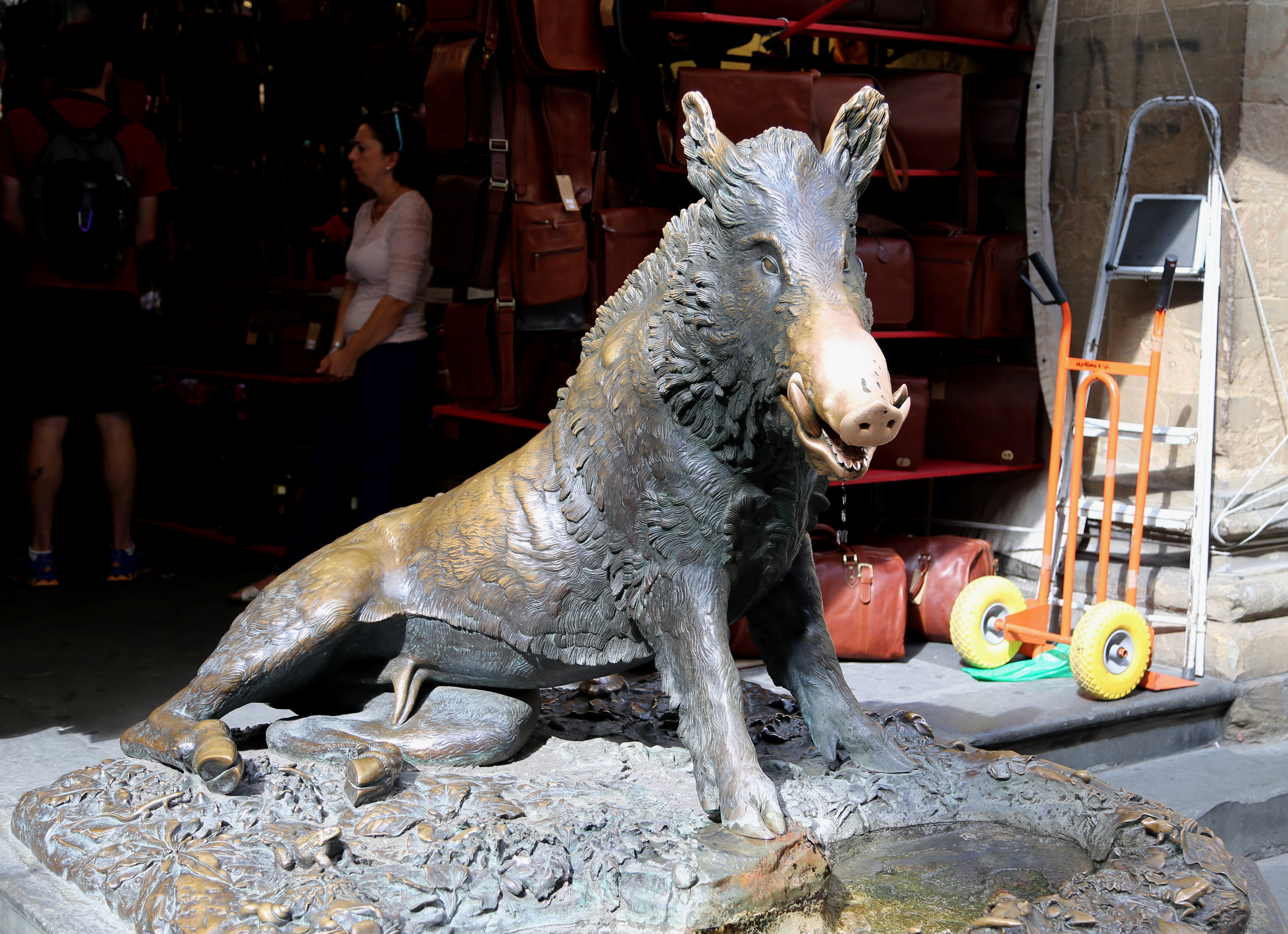 Il porcellino am Mercato Nuovo, Florenz